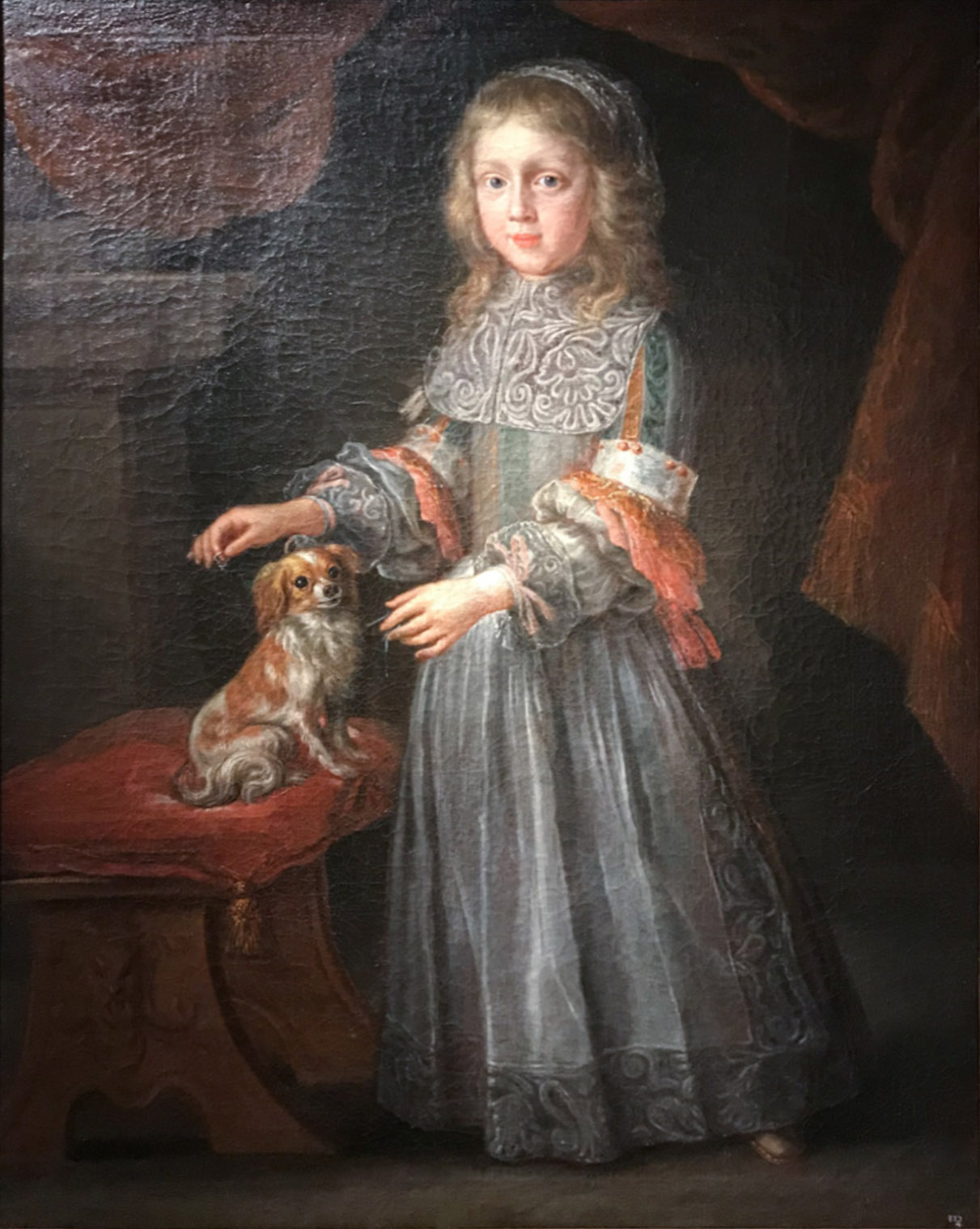 Portrait of Wolfgang Georg Friedrich von der Pfalz (1659-1683)